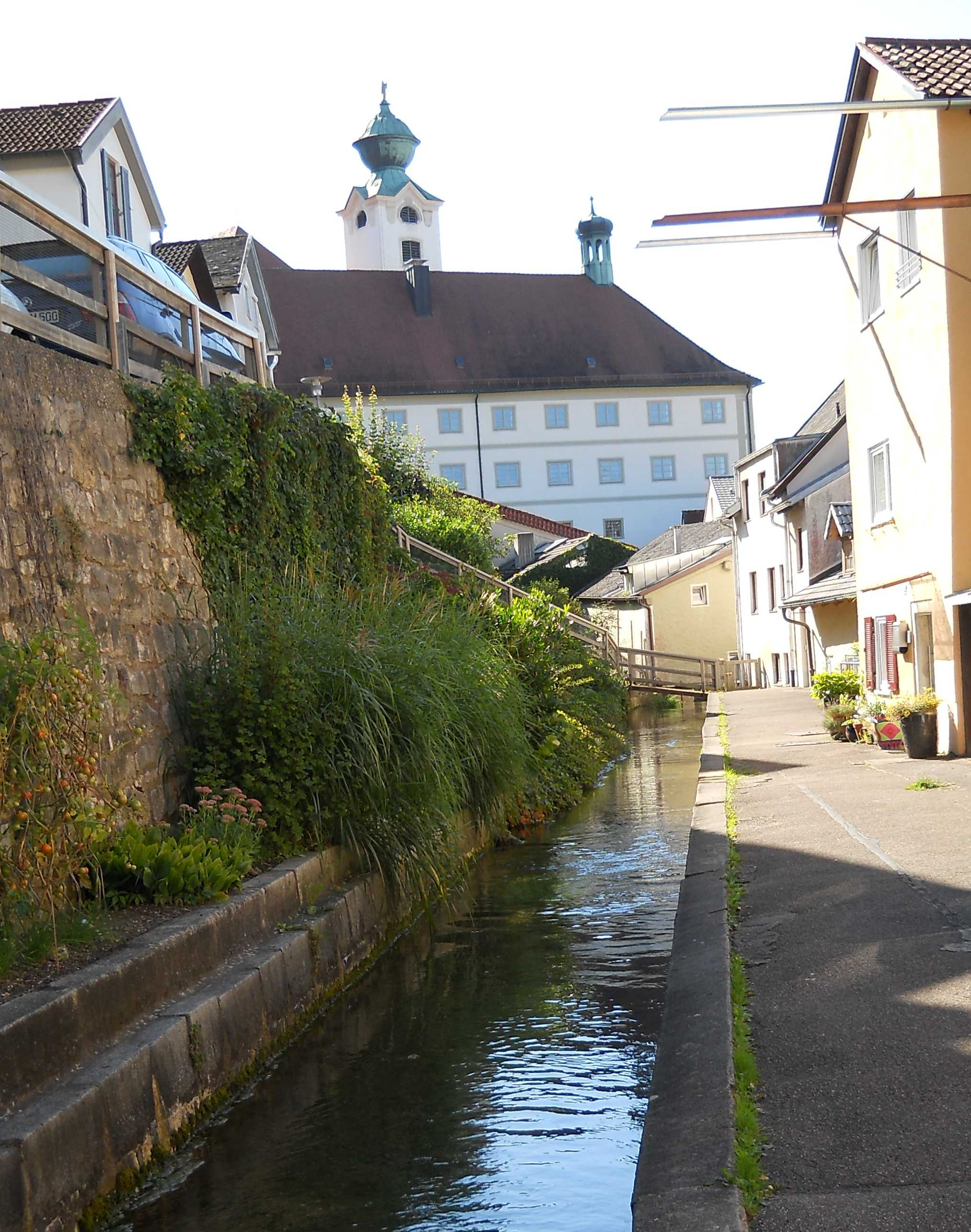 Eichstätt, Kapellbuck hinter der Mariahilf-Kapelle gegen das Kloster St. Walburg hin